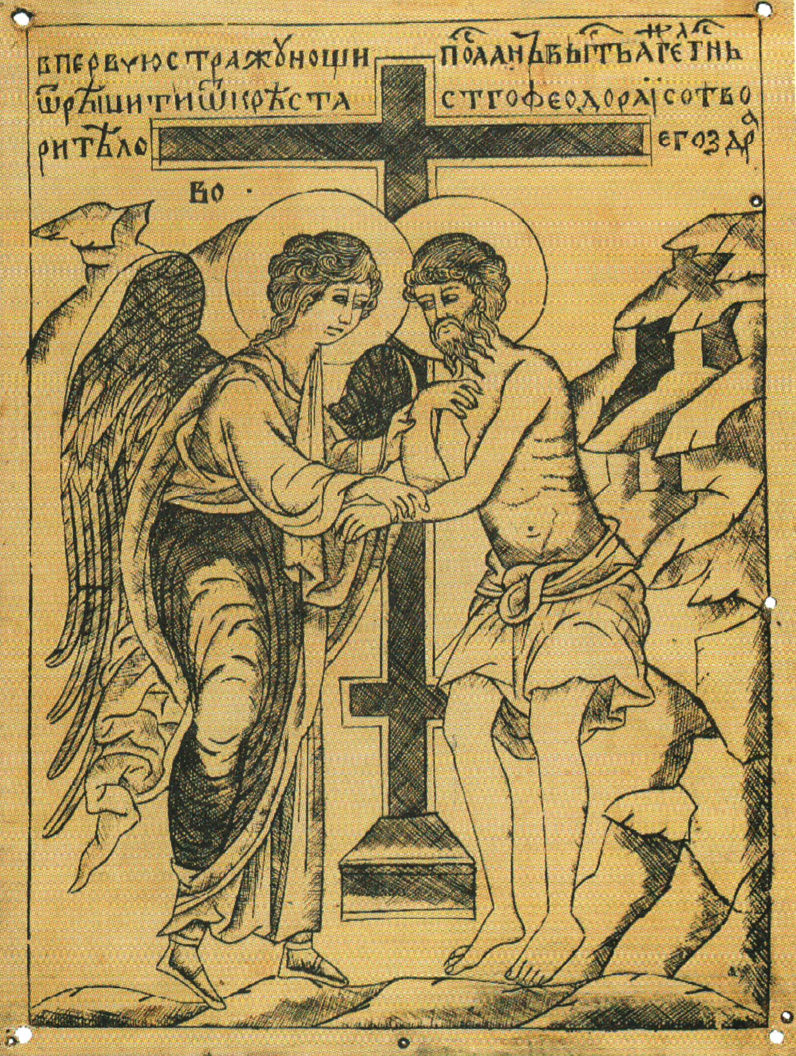 "Спасение святого Феодора Стратилата ангелом". Серебряная пластина от оклада иконы "Феодор Стратилат". Серебро, чеканка, гравировка, чернь, золочение. 16,4 х 11,9 см. Москва, мастерские Кремля, около 1584 года